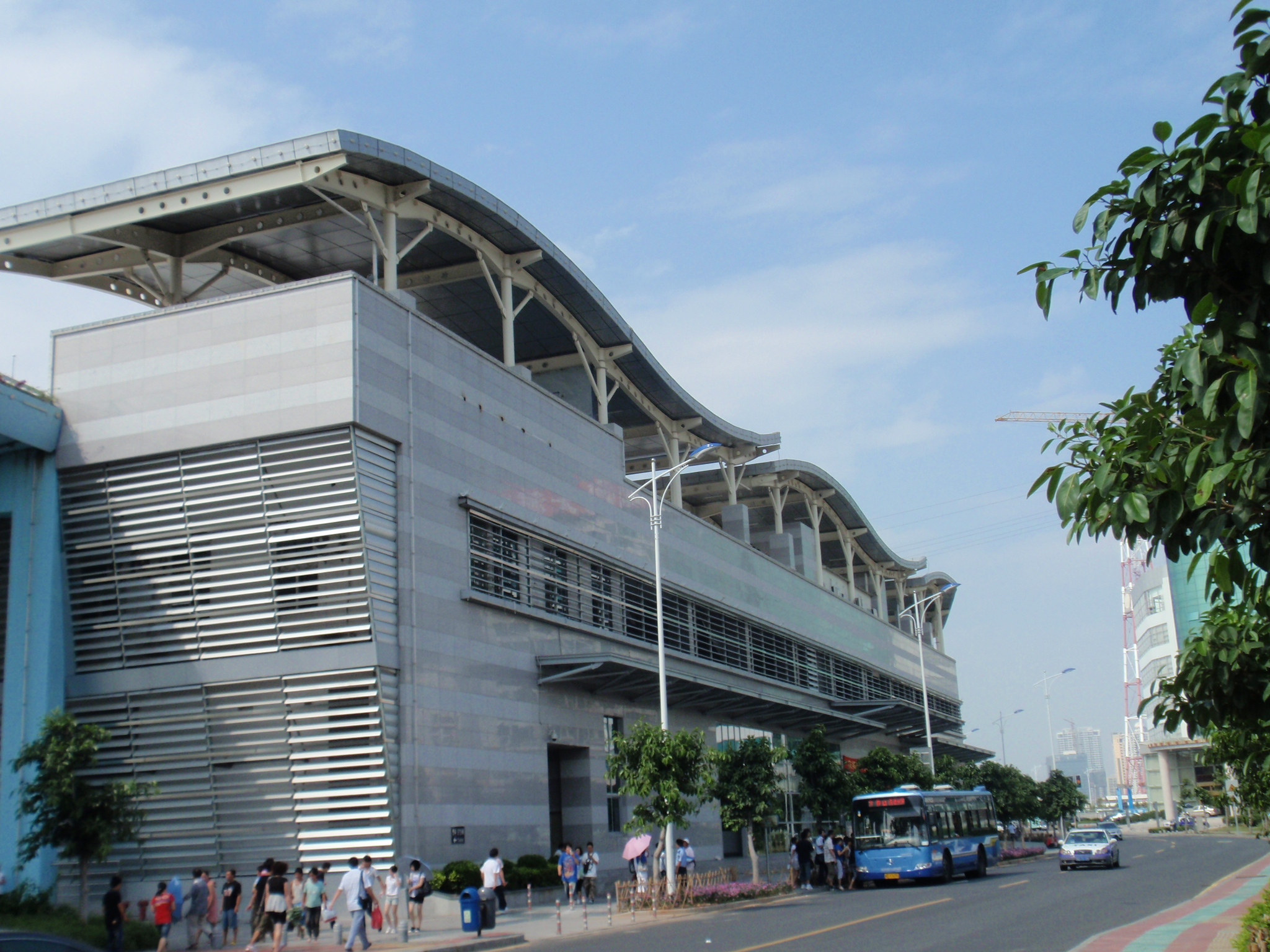 厦门快速公交系统第一码头站